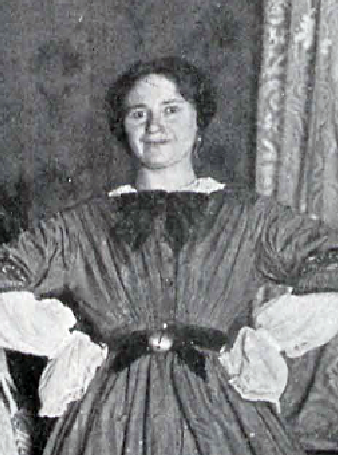 Jenny Marba, Schauspielerin Berlin, in: Die lustigen Weiber von Kytriz, Berliner Lustspielhaus 1905 veröffentlicht in: Berliner Leben. Zeitschrift für Schönheit und Kunst, 1905